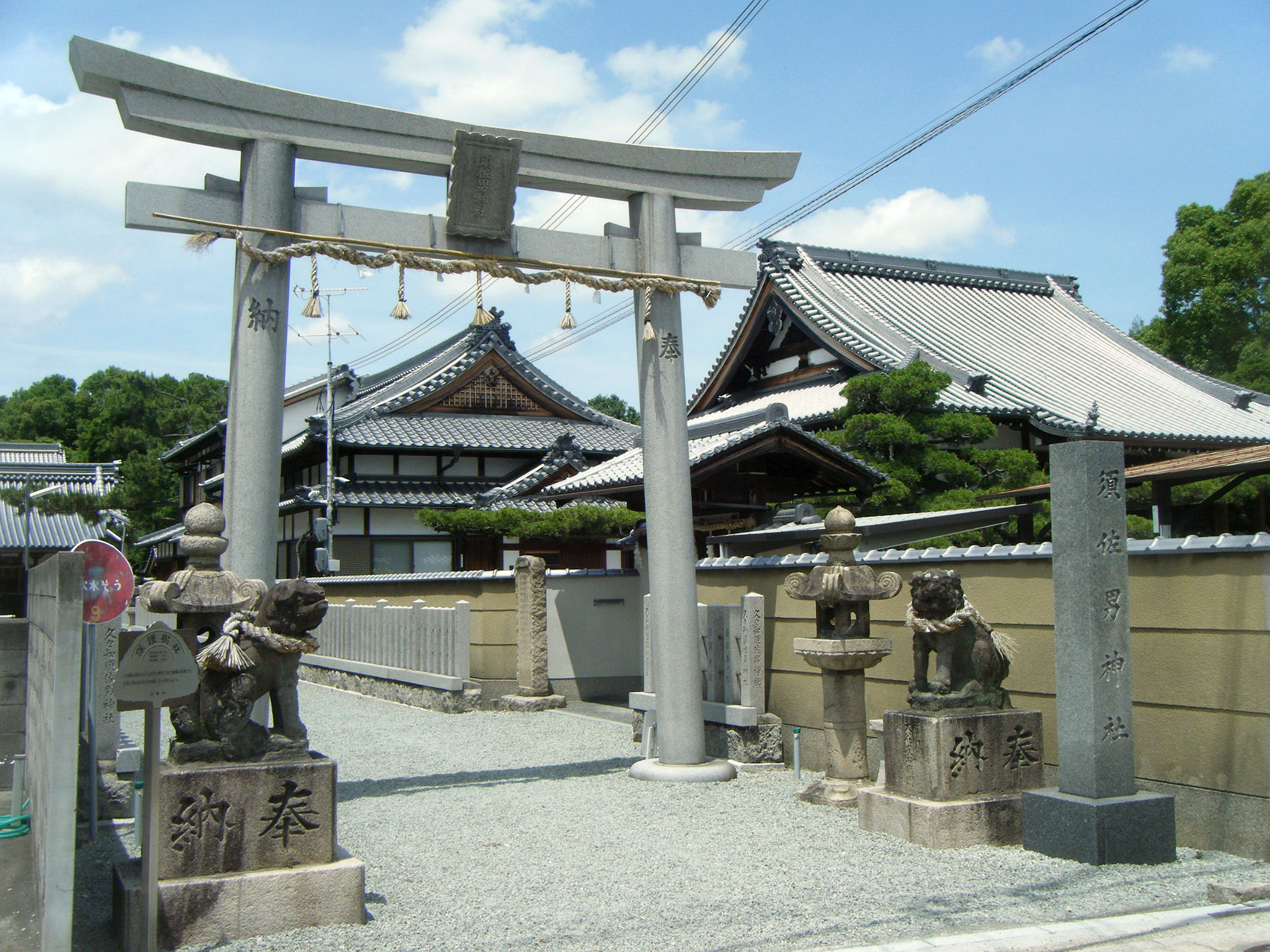 久々知 須佐男神社 鳥居 兵庫県尼崎市